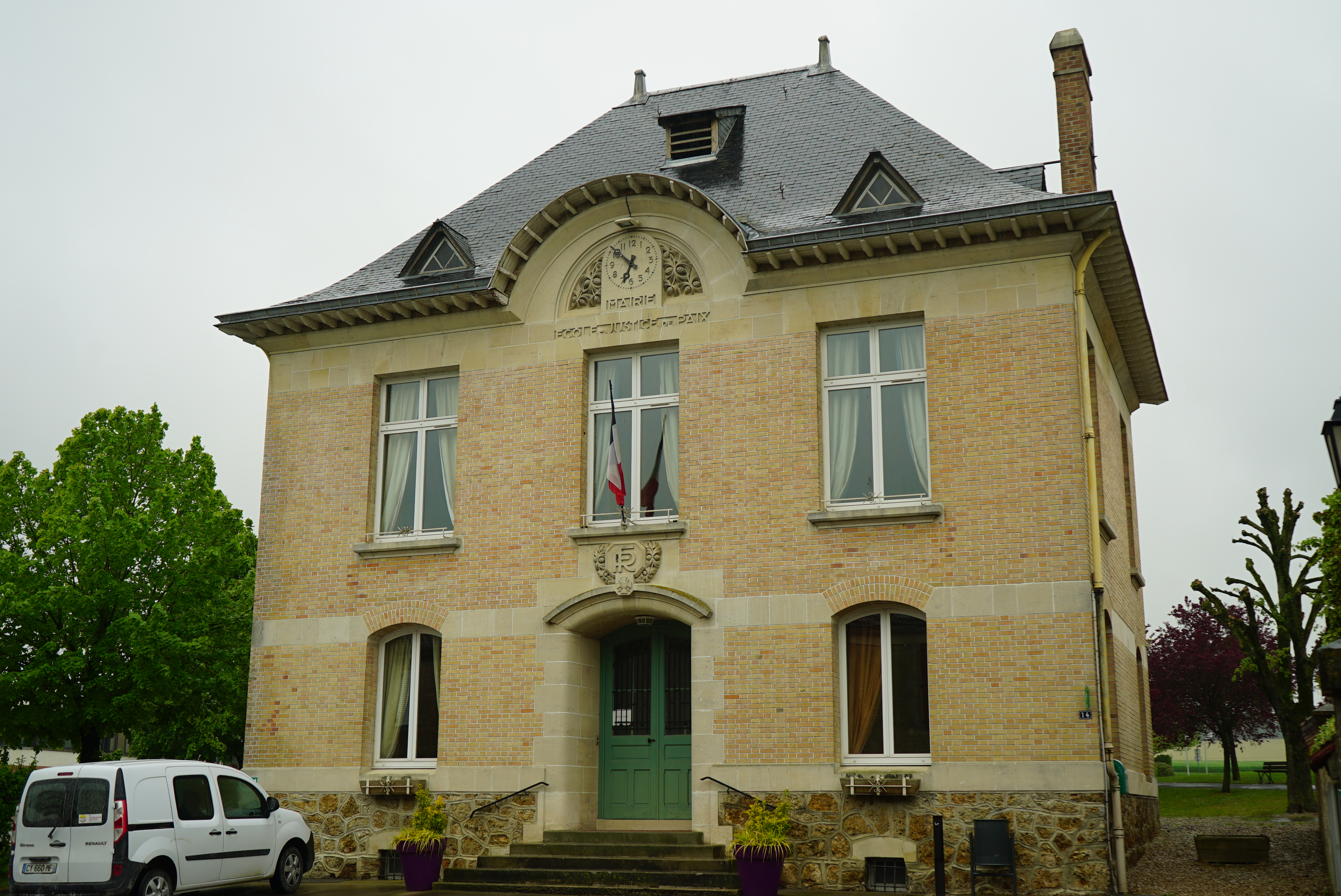 de Marson.